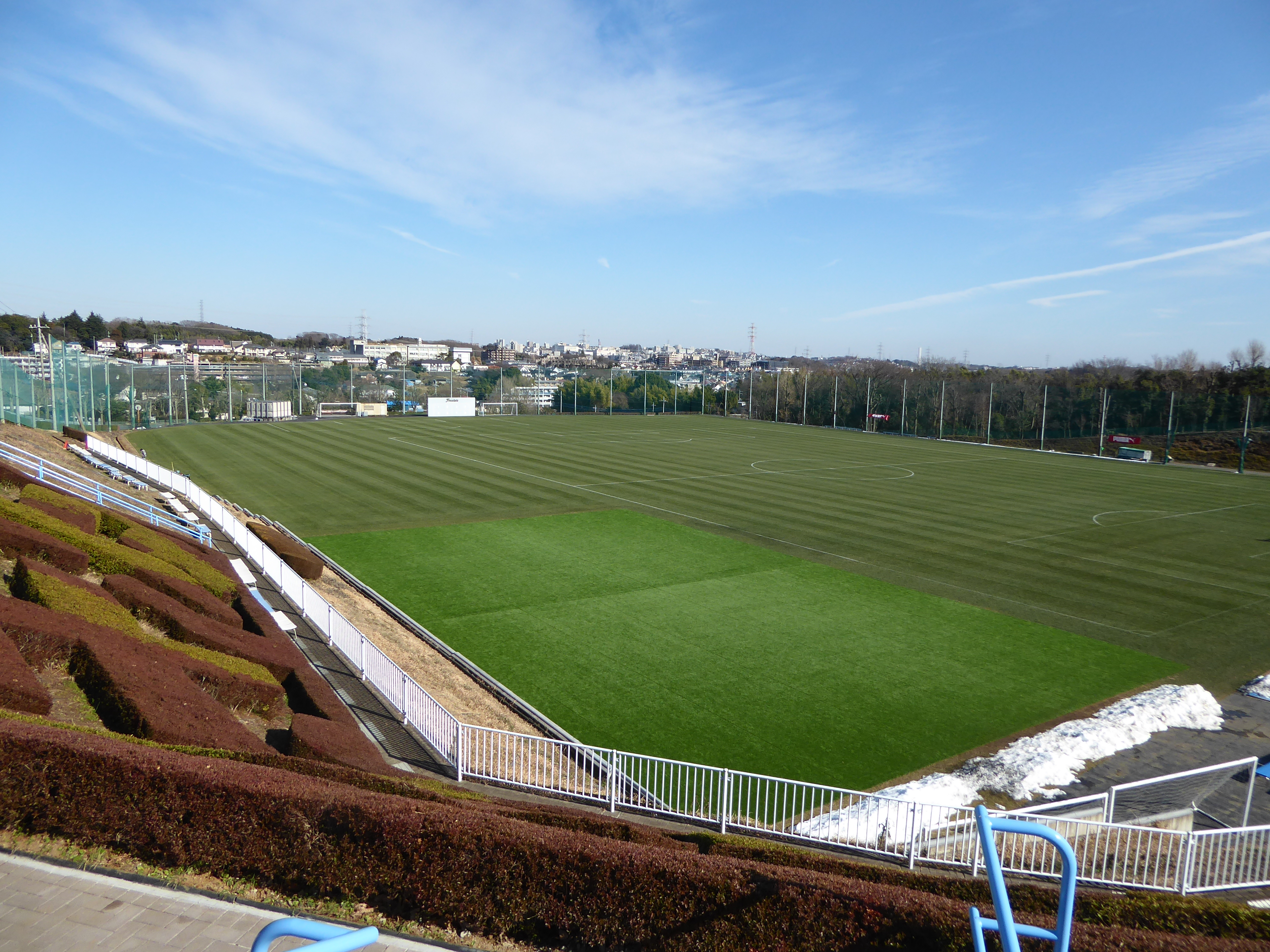 川崎フロンターレ・麻生グラウンド（川崎市麻生区）2016年1月27日撮影